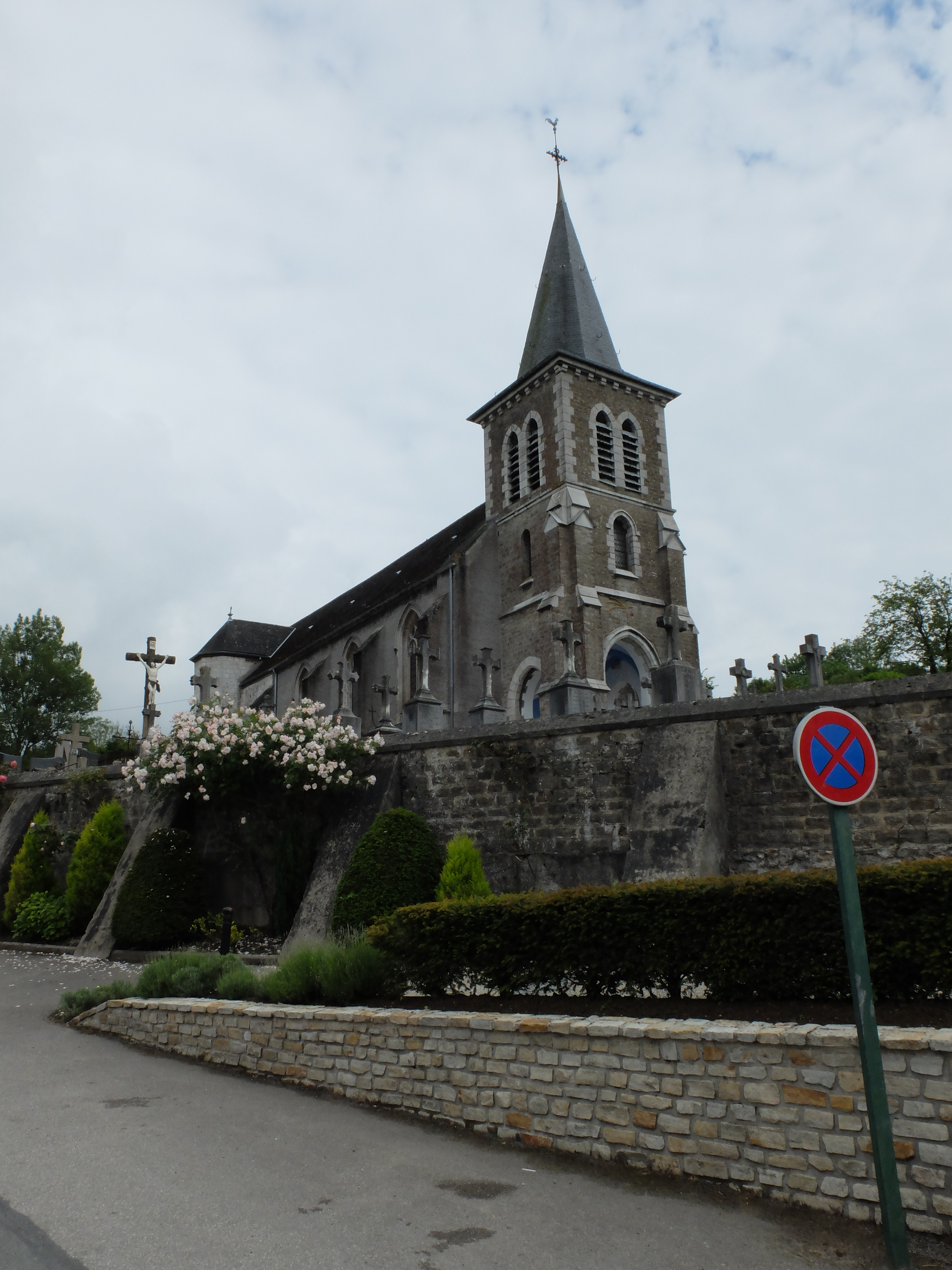 Vue de l'église de Nesles.